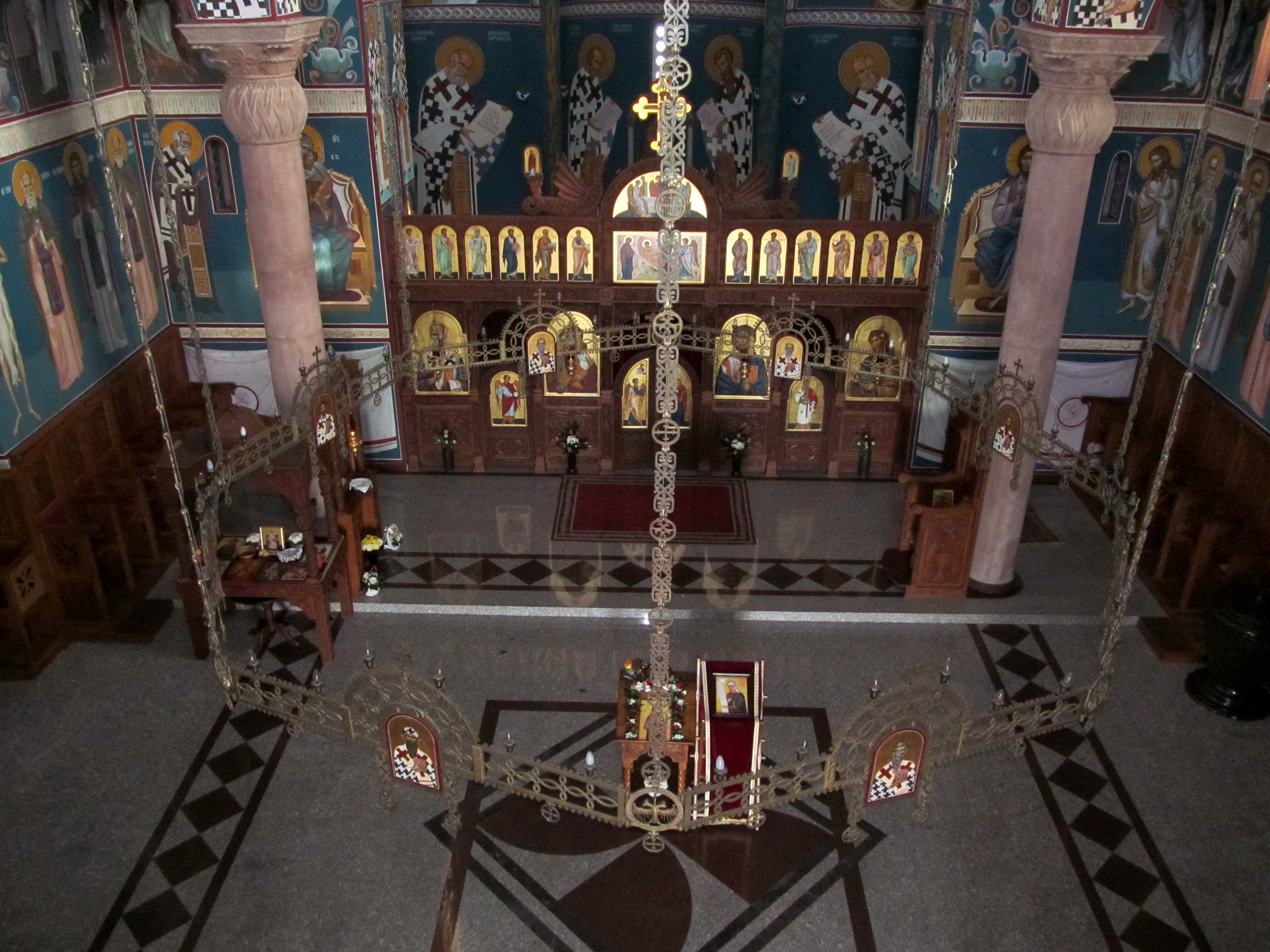 Унутрашњост Храма Сабор Светих Апостола